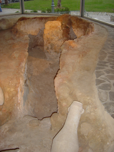 Hornos Púnicos de Torre Alta (Rotonda de los Hornos Púnicos, San Fernando, Cádiz).